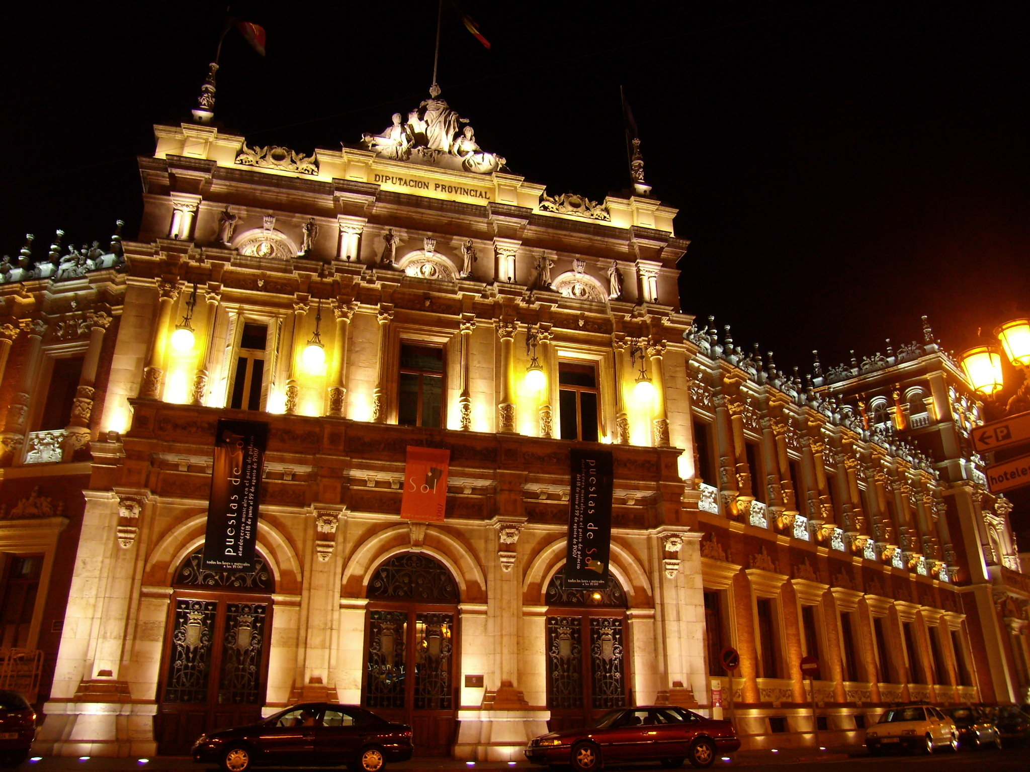 Vista nocturna del palacio de la Diputación provincial de Palencia, obra del arquitecto palentino Jerónimo Arroyo.